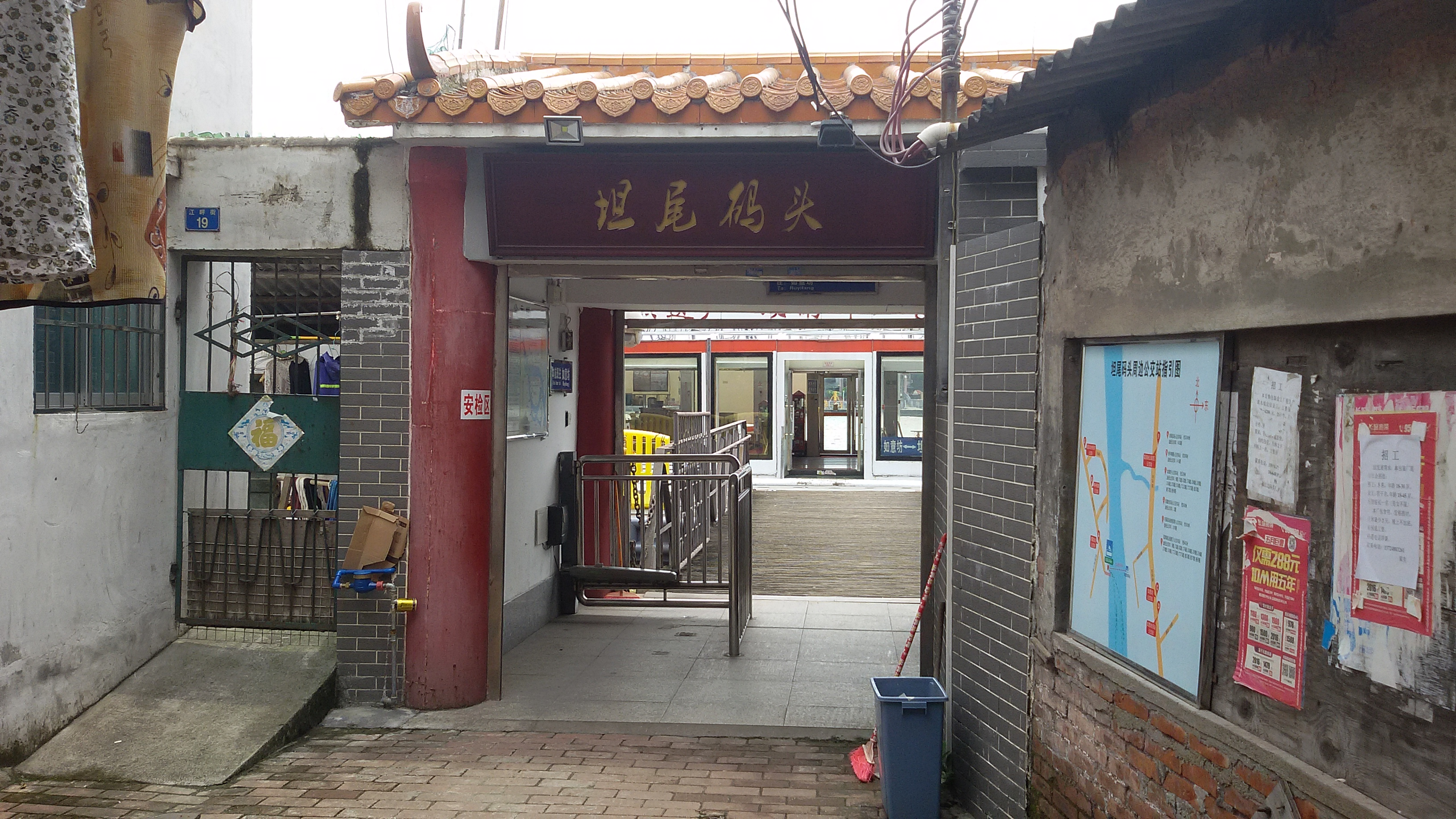 粵語: 坦尾碼頭